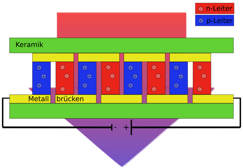 Peltier-Element. Bei gezeigter Beschaltung wird die obere Keramik im Vergleich zur unteren Keramik erwärmt.